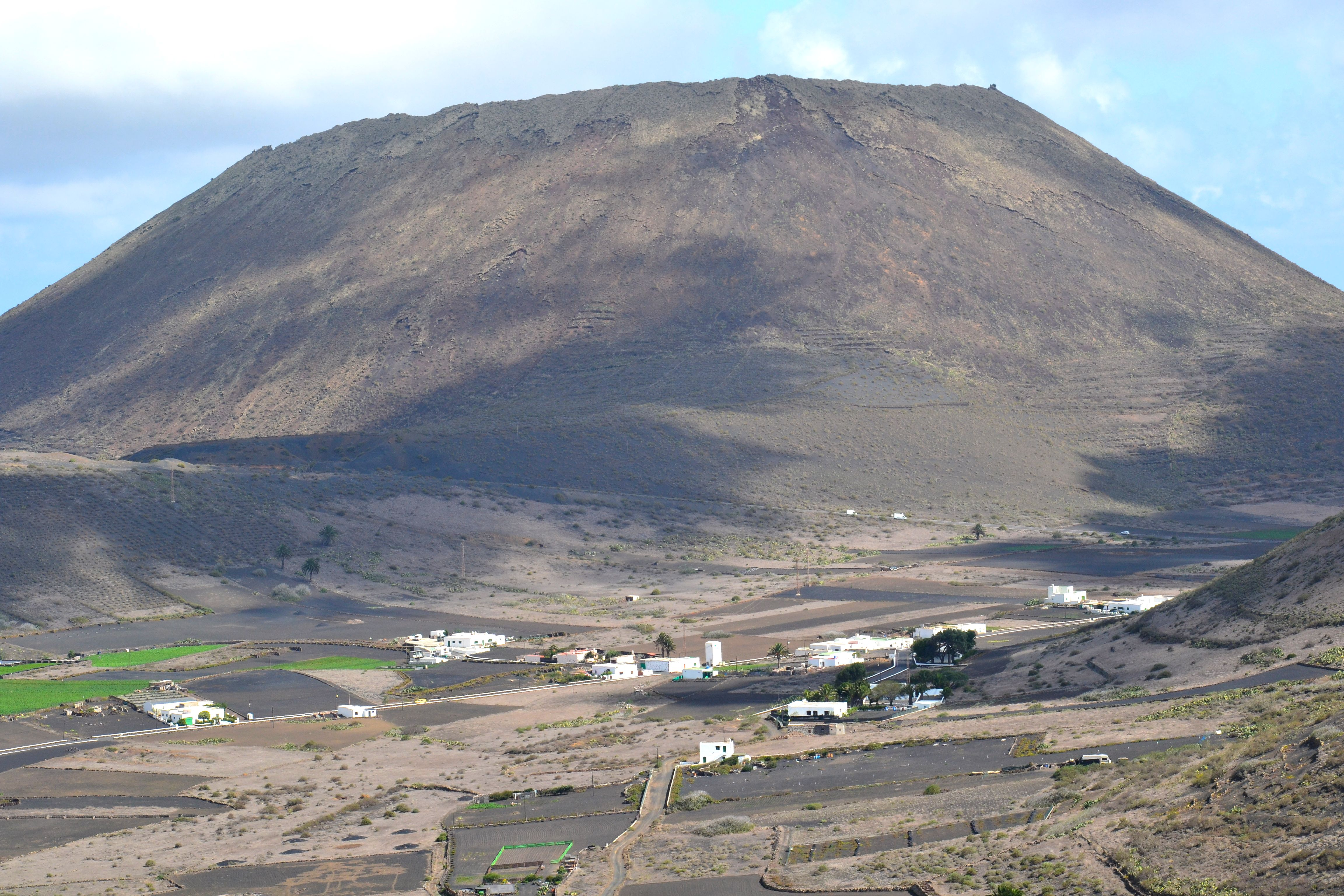 Guinate, Lanzarote, Kanarische Inseln, Spanien